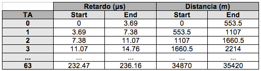 Relación existente entre la distancia del terminal y el retaso de la señal.